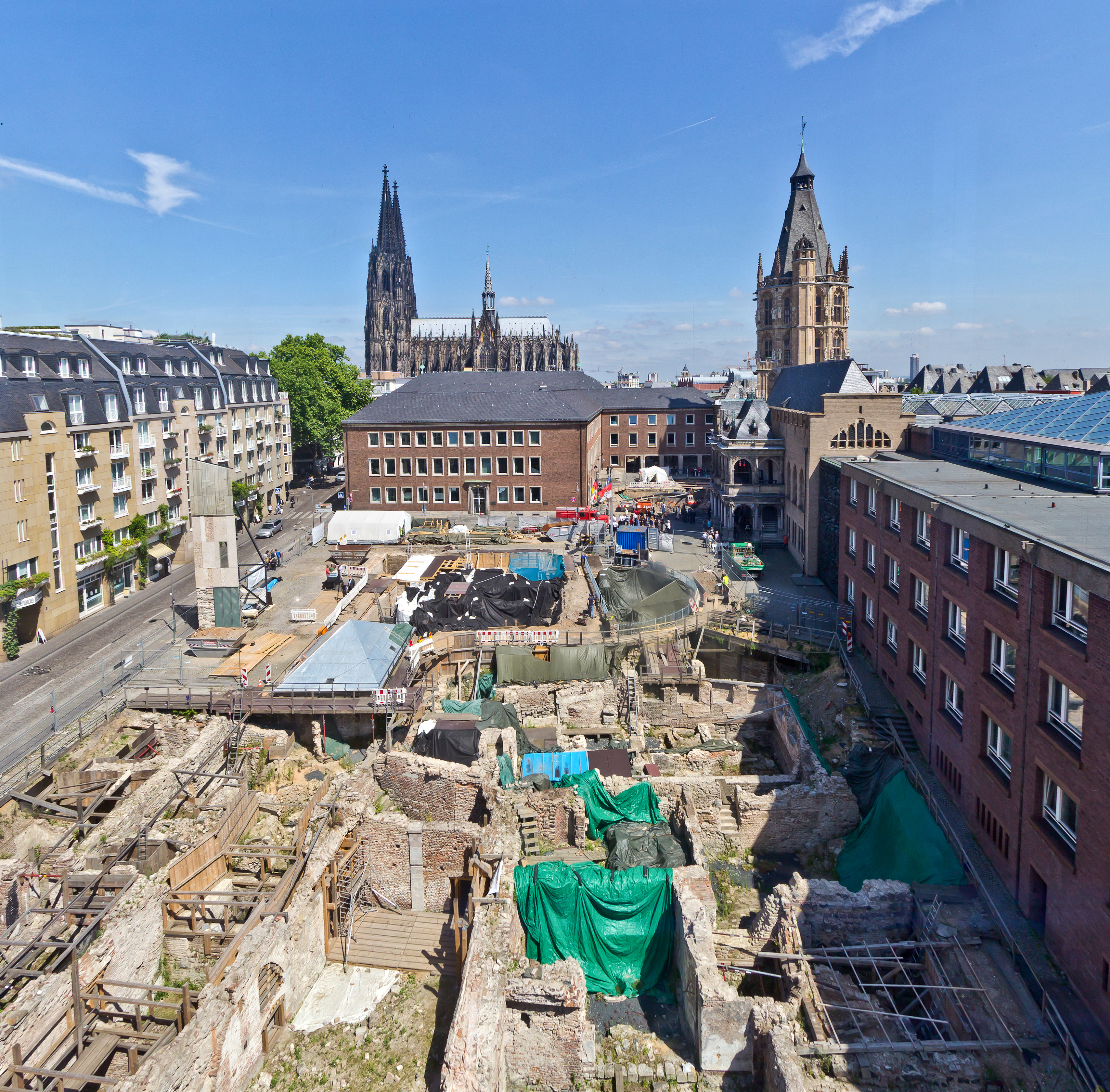 Archäologische Zone Köln - Überblick Juni 2014